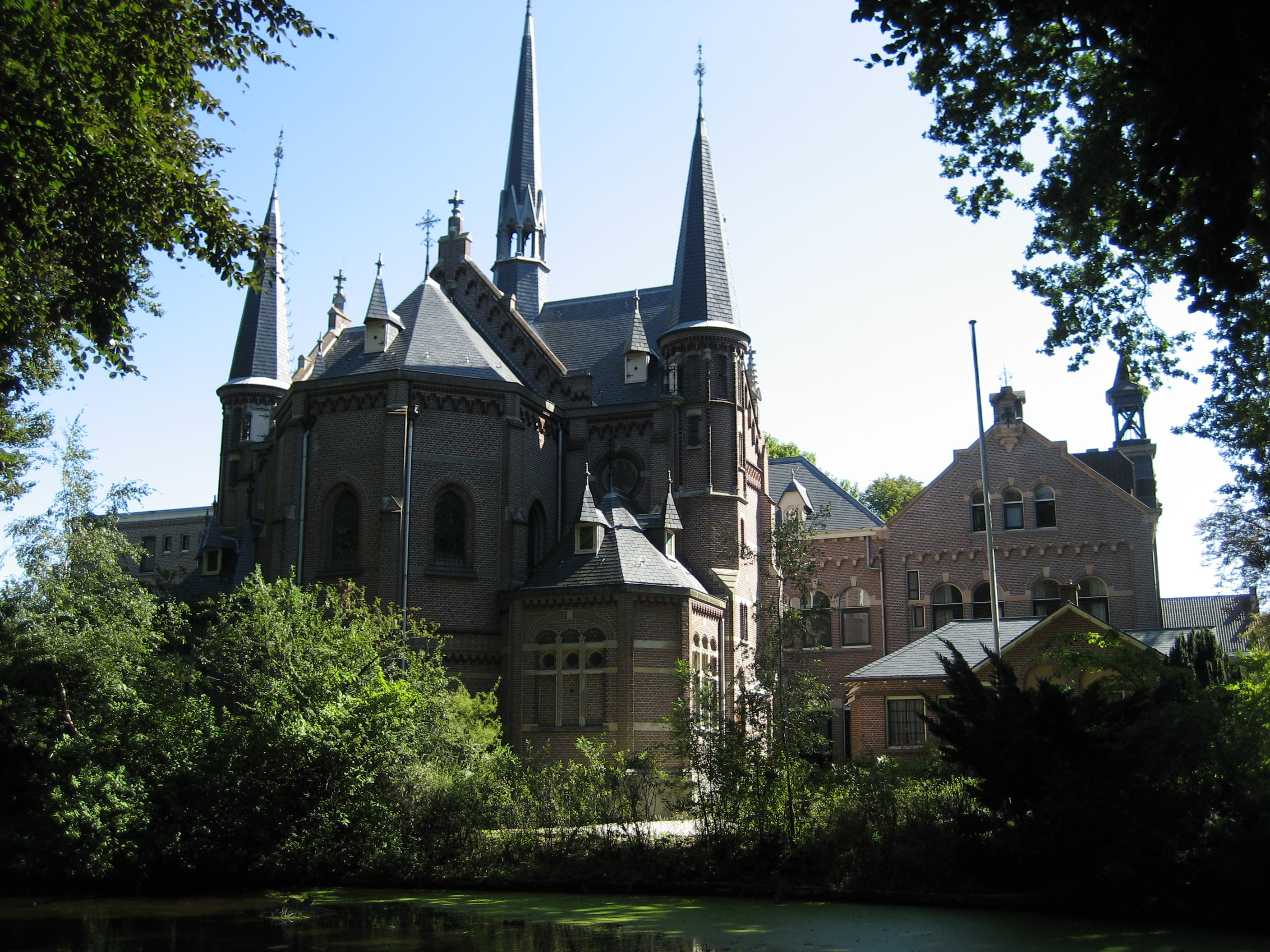 Kloosterkapel in Voorschoten, South Holland, the Netherlands